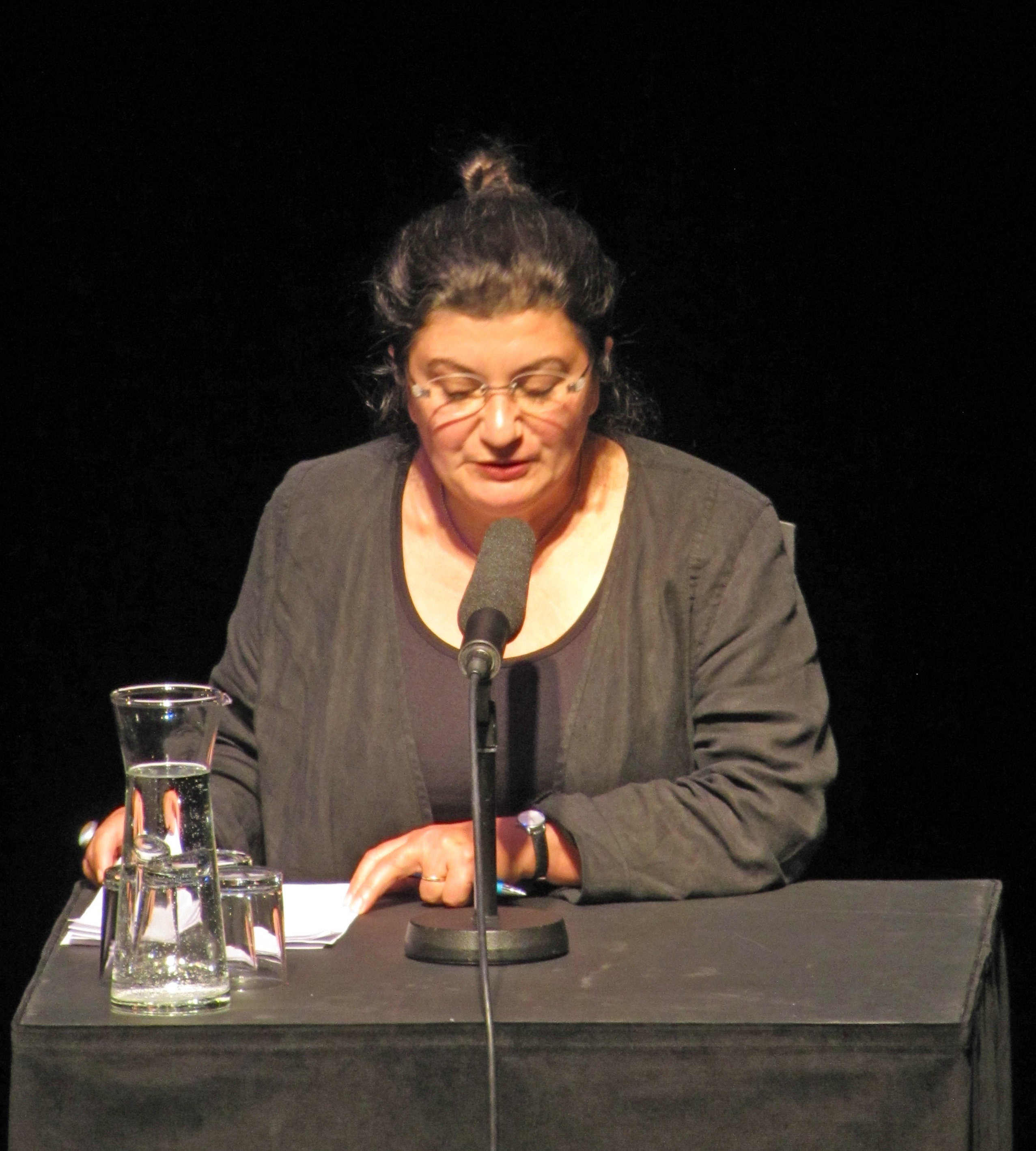 Canan Topçu, am 21. Mai 2017, auf der Bühne des Schauspiel Frankfurt bei der Solidaritäts-Matinee für Deniz Yücel und inhaftierte Journalistinnen und Journalisten in der Türkei.